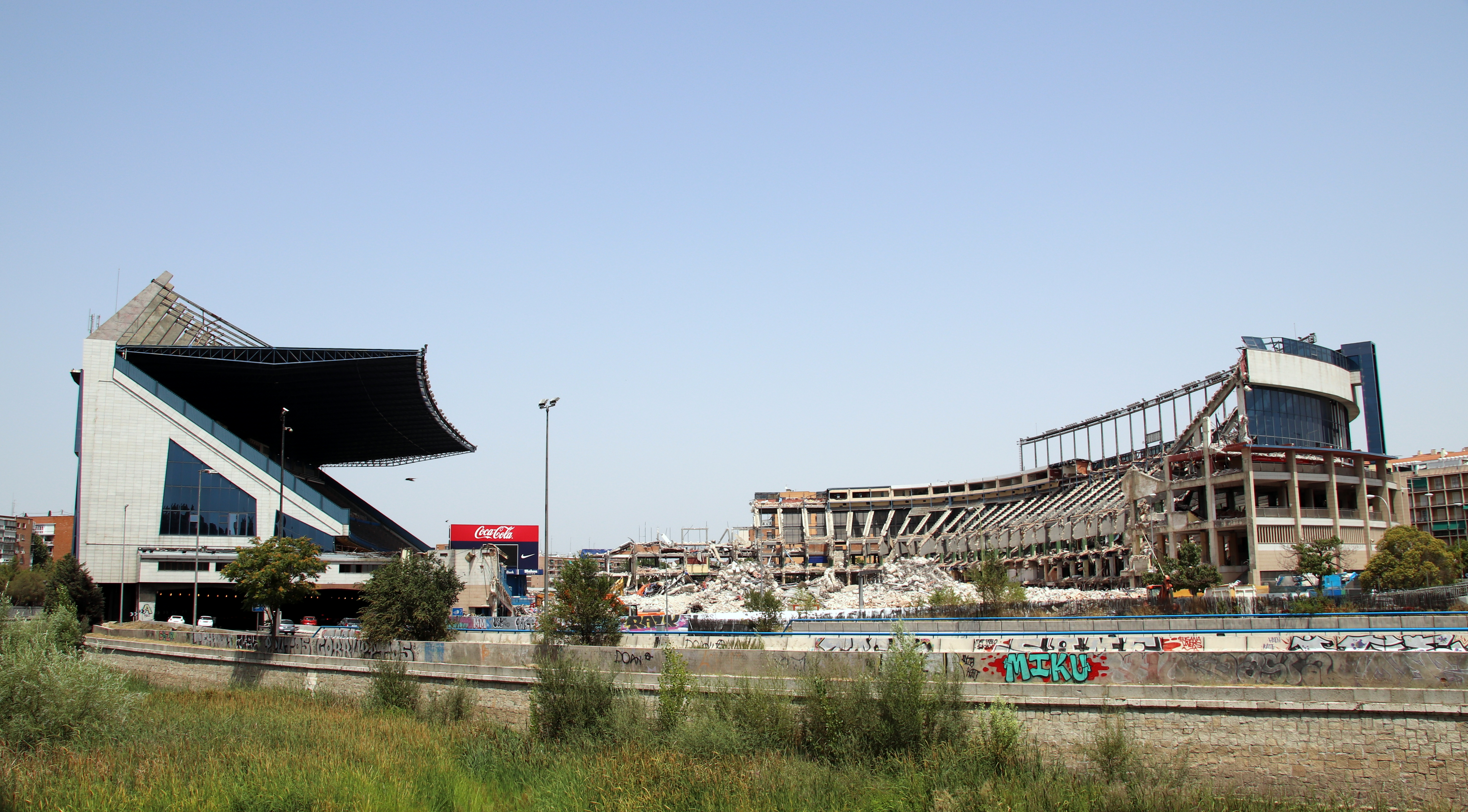 Estadio Vicente Calderón durante su demolición